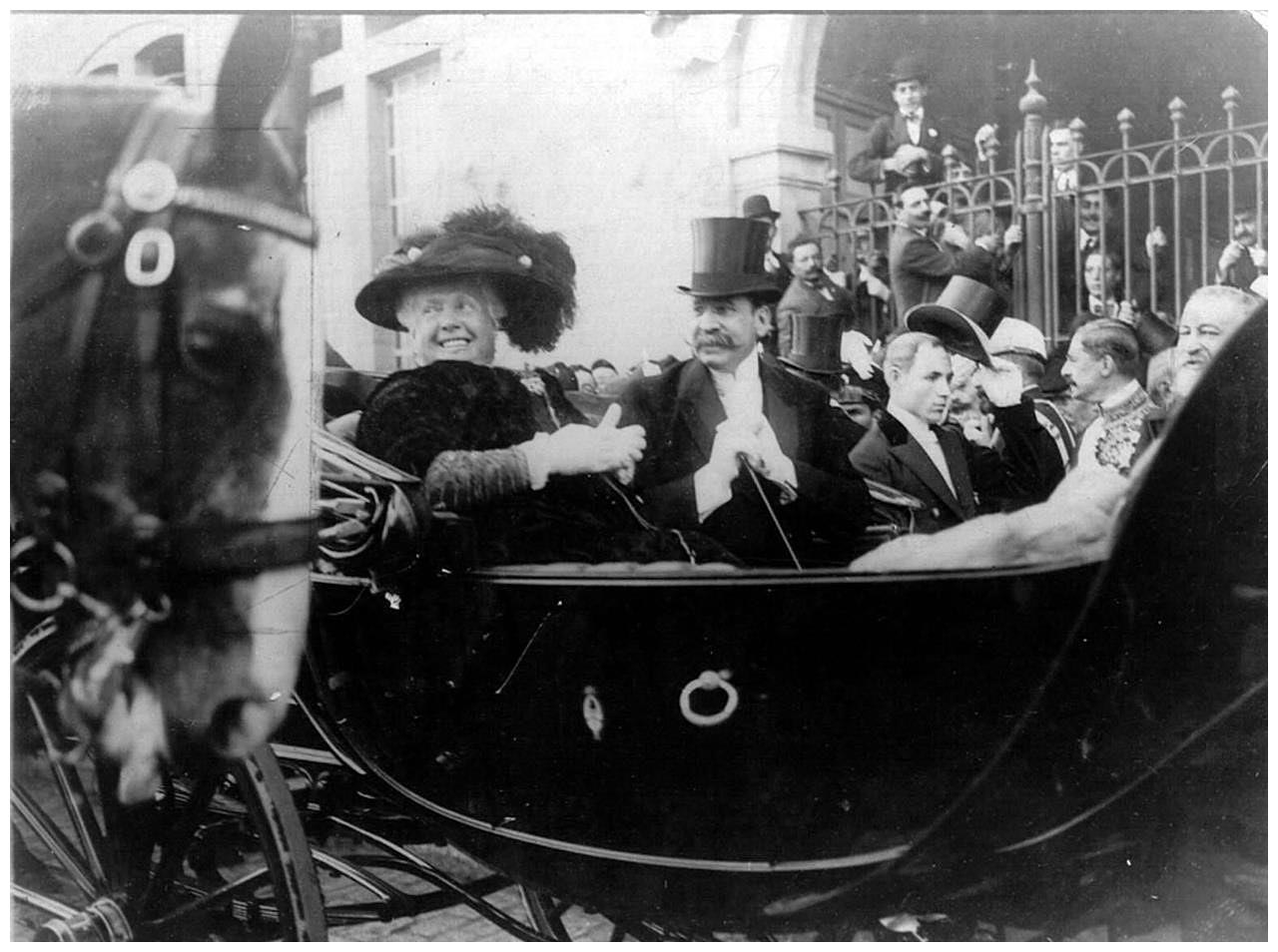 La Infanta Isabel de Borbón y el Presidente de Argentina Figueroa Alcorta, partiendo en carruaje desde la Dársena Norte de Buenos Aires.